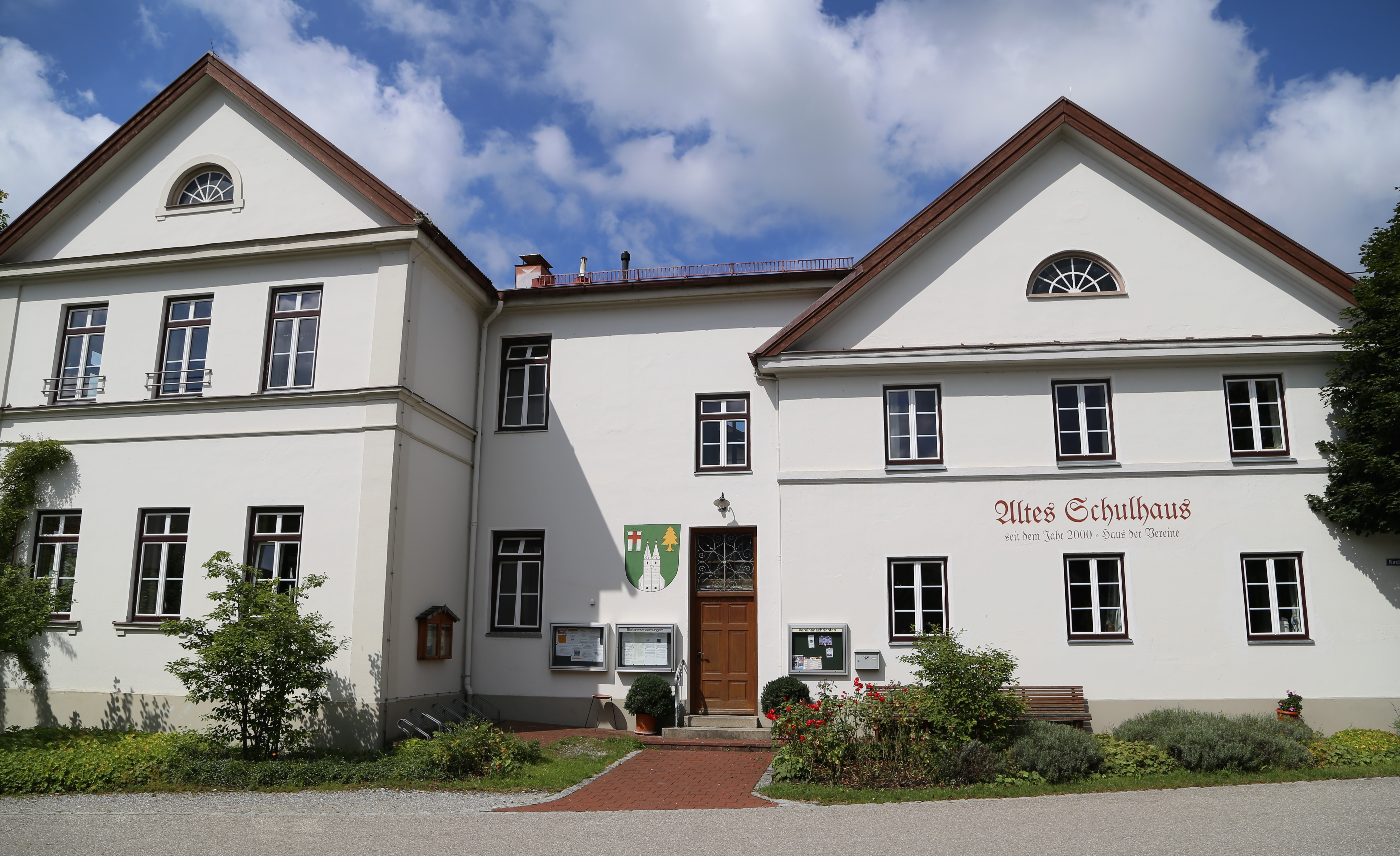 Lindenstraße 1, Schönau, Tuntenhausen; ehem. Schulhaus, seit 2000 Haus der Vereine, zwei zweigeschossige klassizisierende Giebelbauten mit Satteldach, durch Querbau miteinander verbunden, bez. 1842.